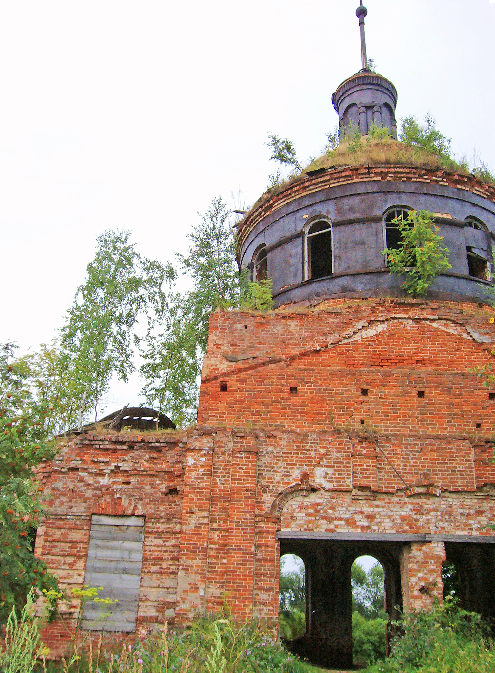 Вознесенский храм в Дубёнках до начала восстановления